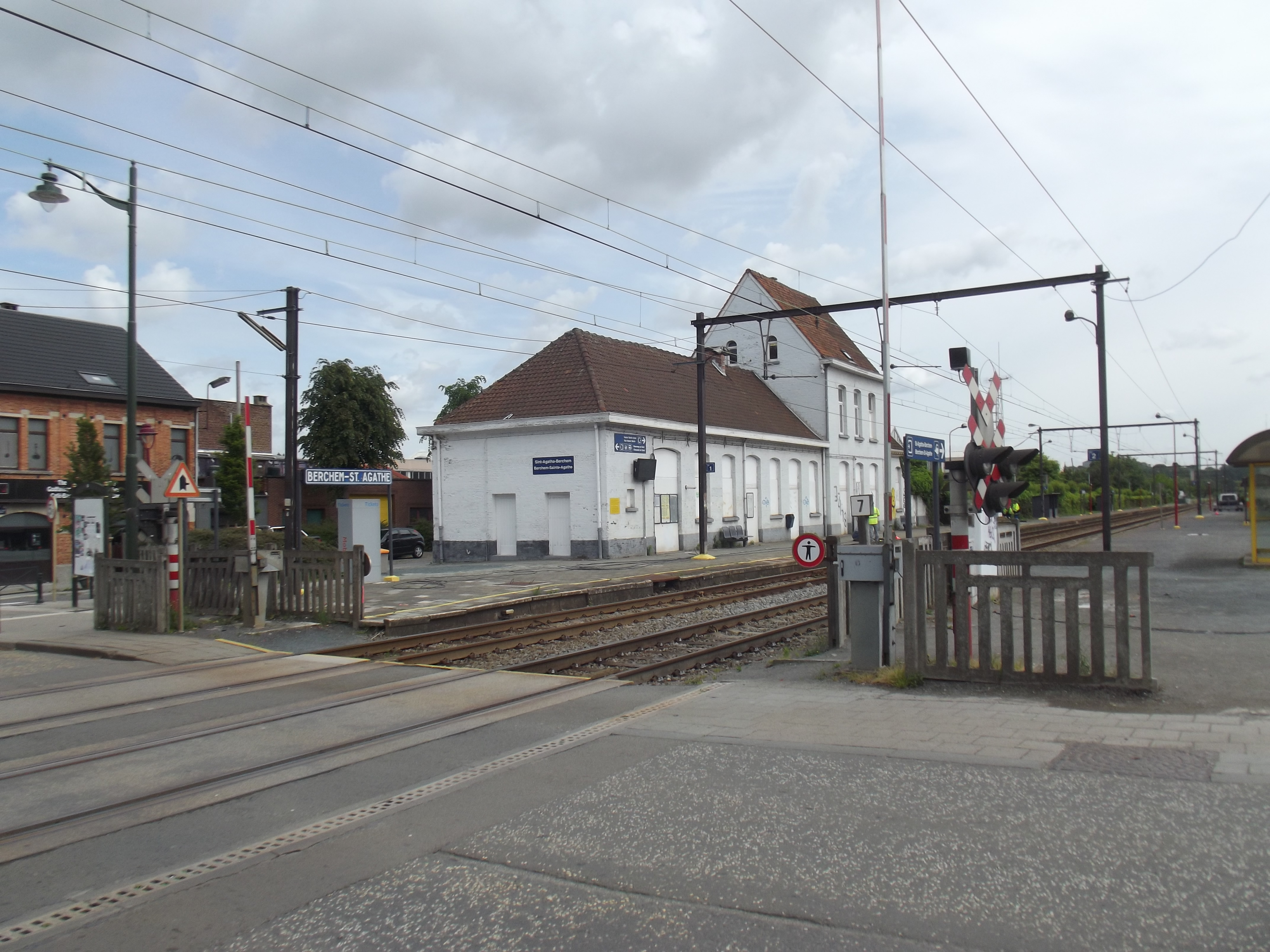 Overweg en station Sint-agatha Berchem